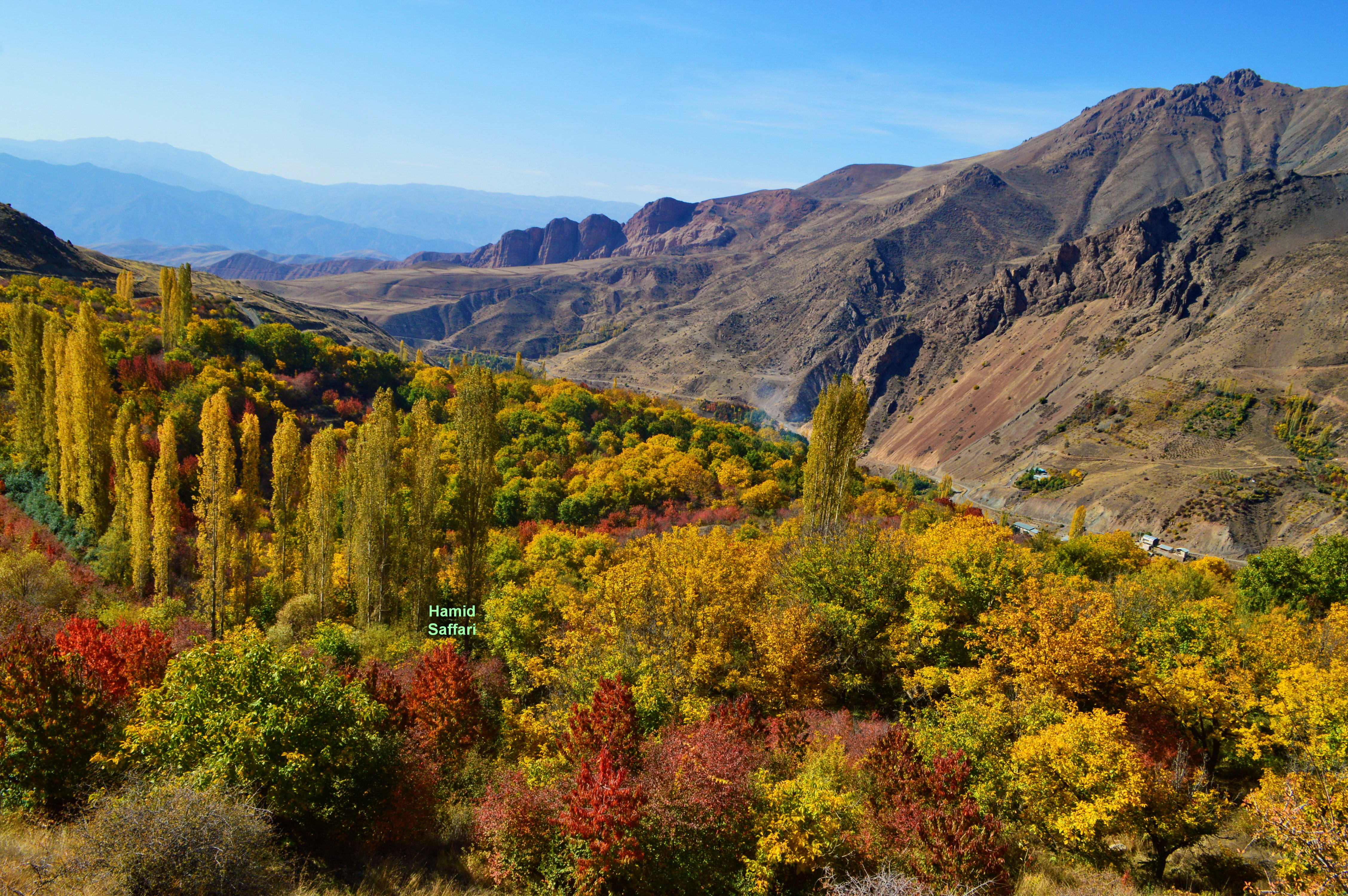 کوچنان ، الموت ، استان قزوین ، ایران